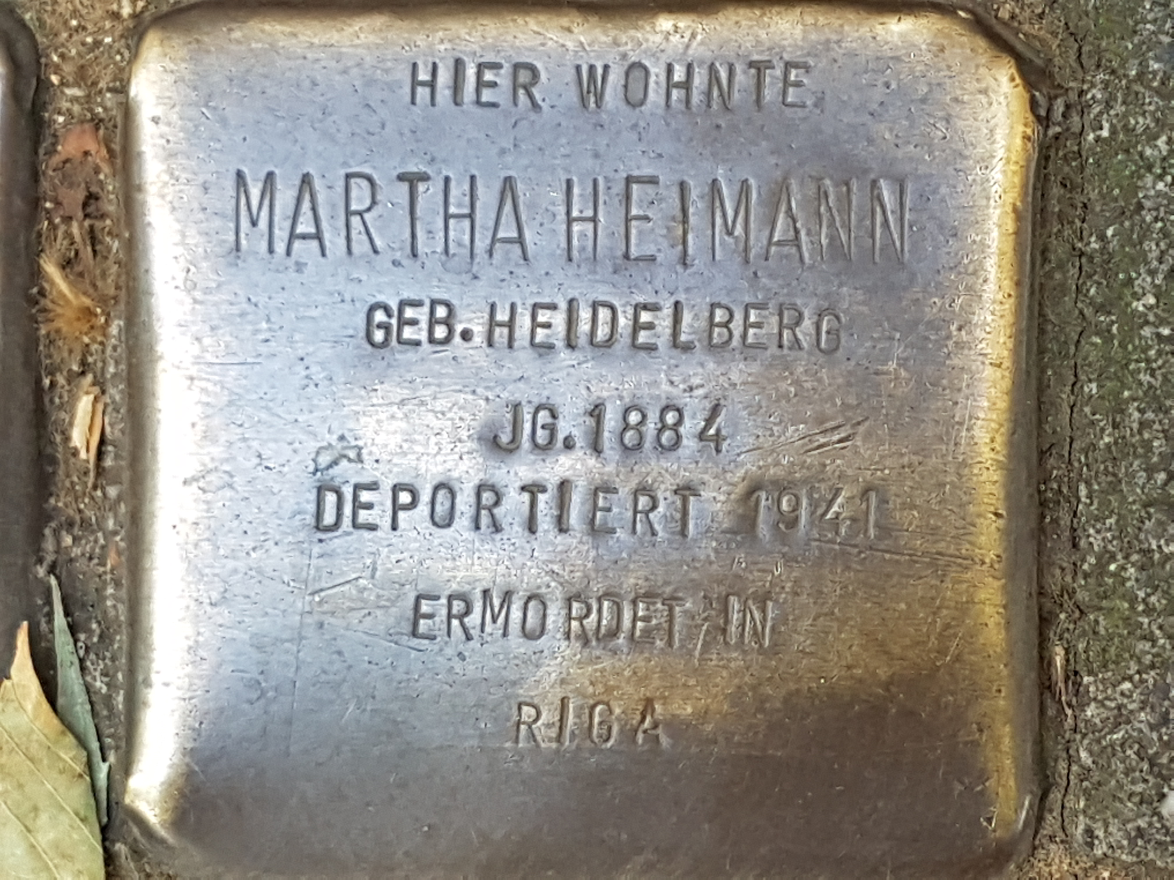 Stolperstein Duisburg